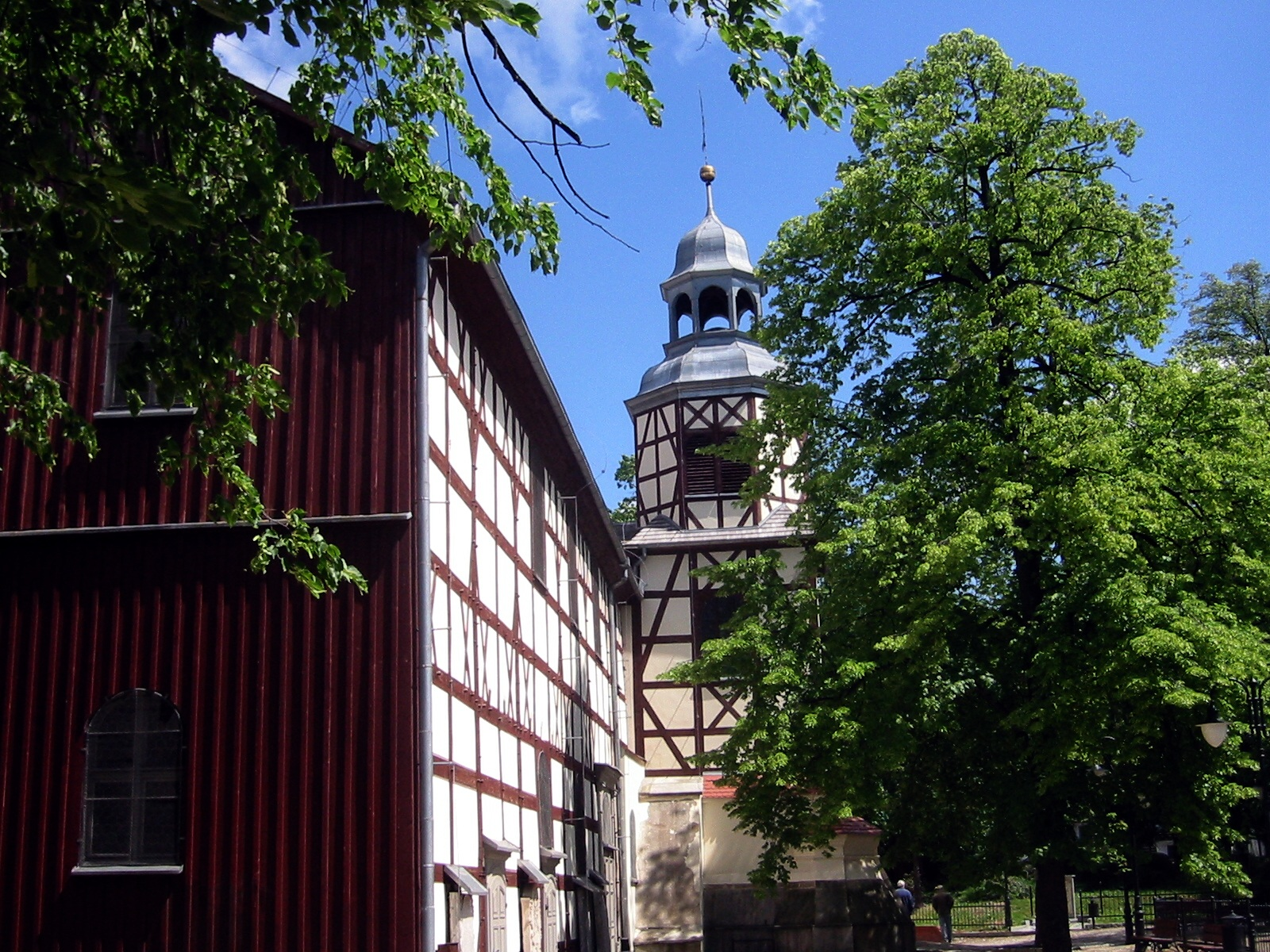 Friedenskirche Jauer, Aussenansicht